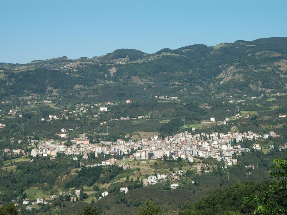 Kendi arsivimden, A CITY IN tURKEY. Aybastı, Ordu